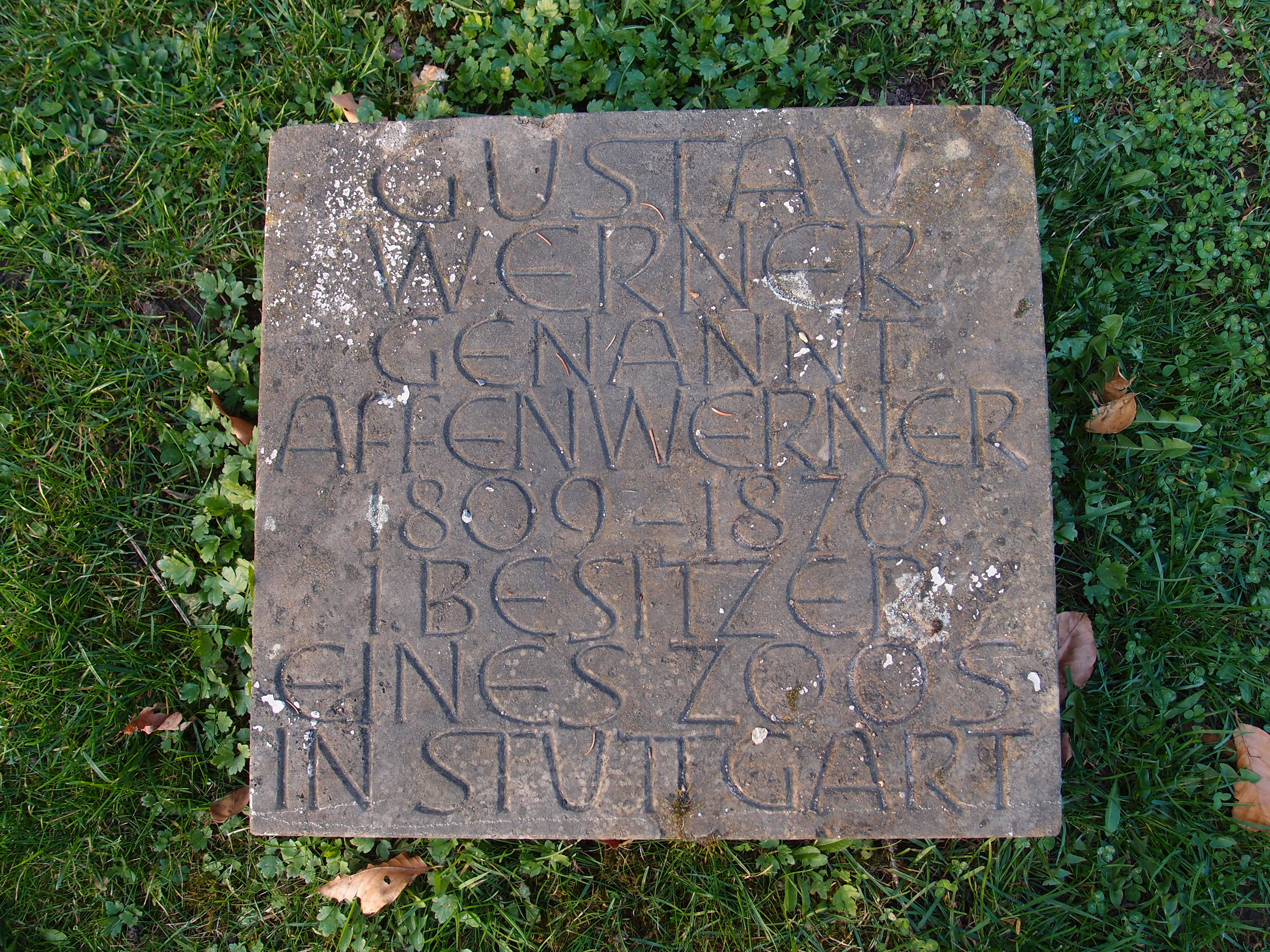 Grab von Gustav Friedrich Werner, genannt Affenwerner (1809-1870), Cafetier und Tiergartenbesitzer, auf dem Stuttgarter Fangelsbachfriedhof, Abteilung 01